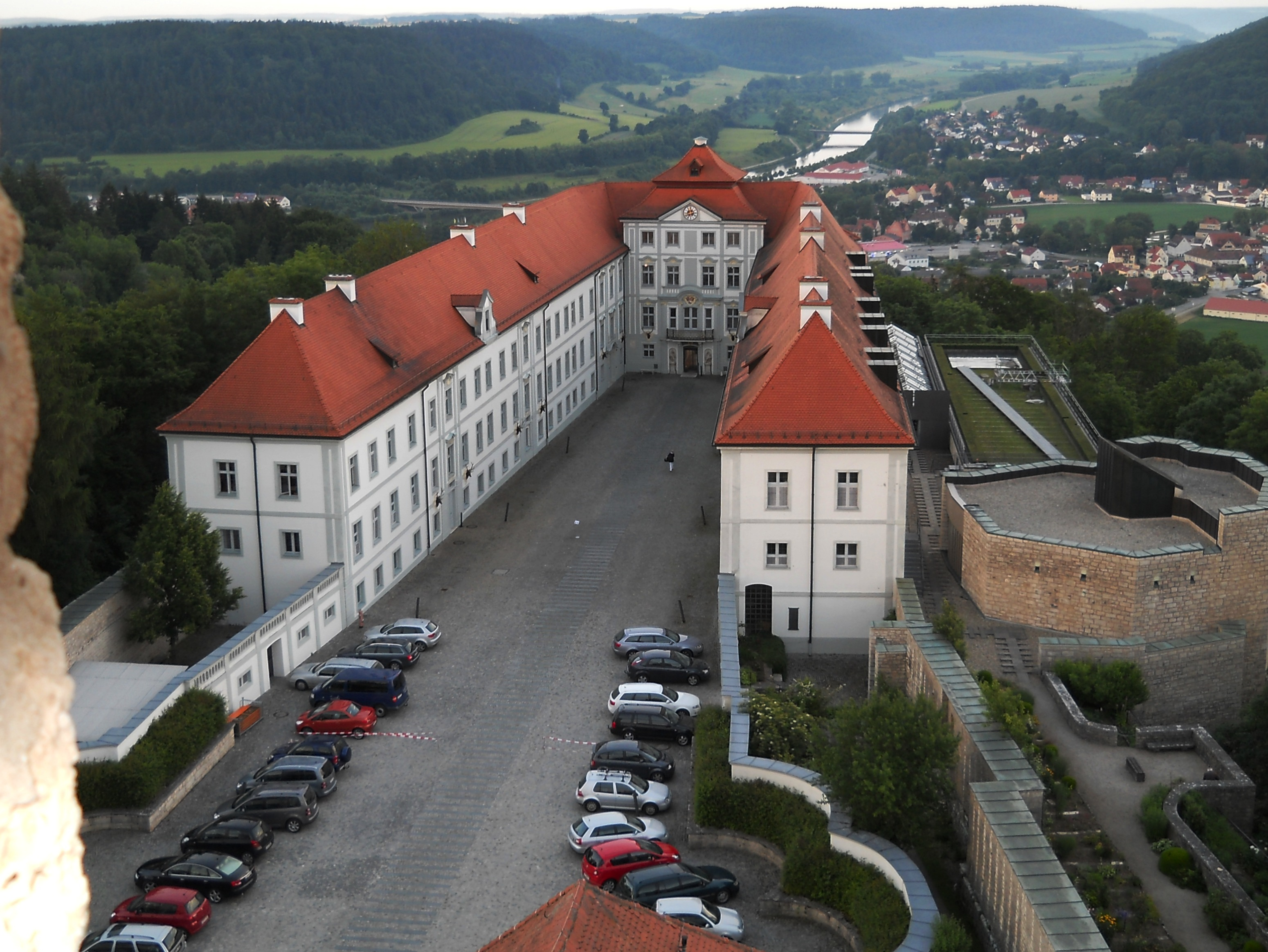 Schloss Hirschberg bei Beilngries über dem Altmühltal